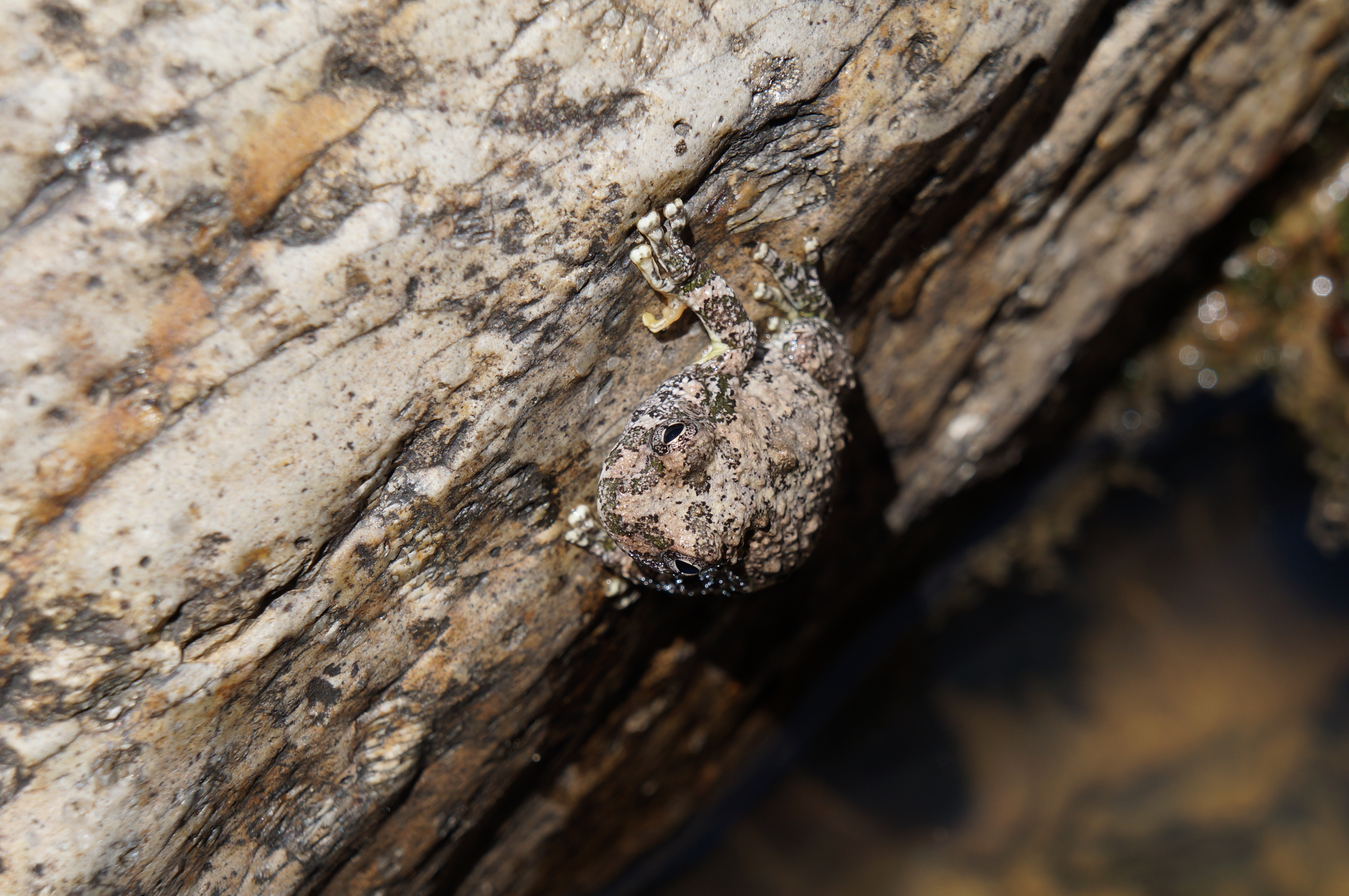 Es común encontrar ranas en los cuerpos de agua en Sierra de Cardos (Jerez de García Salinas). Generalmente son del color de su medio.